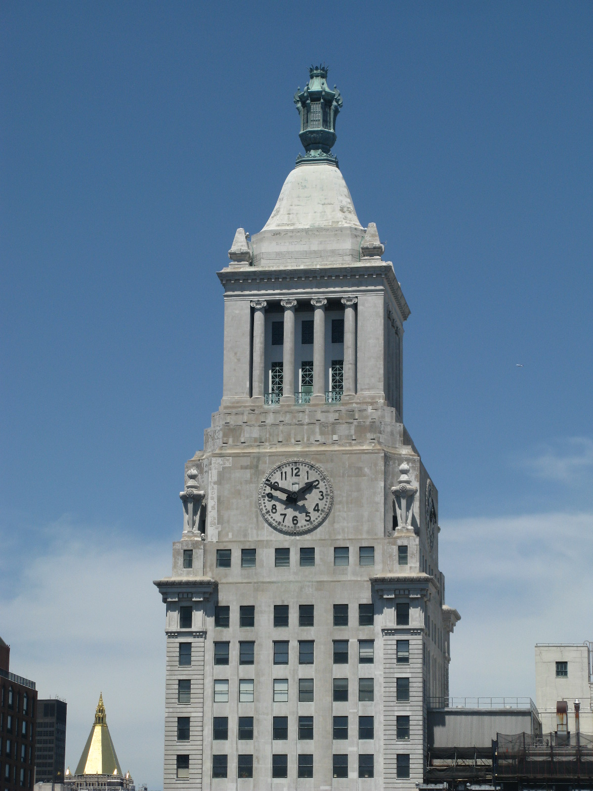 View from dorm window